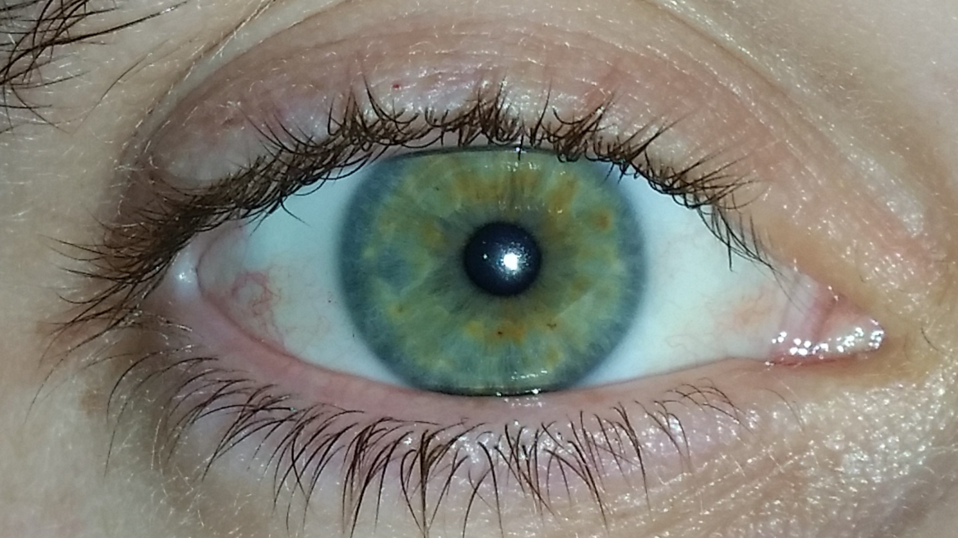 bright green eye